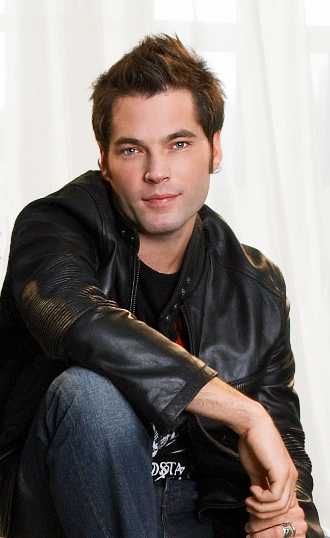 Tim Rozon